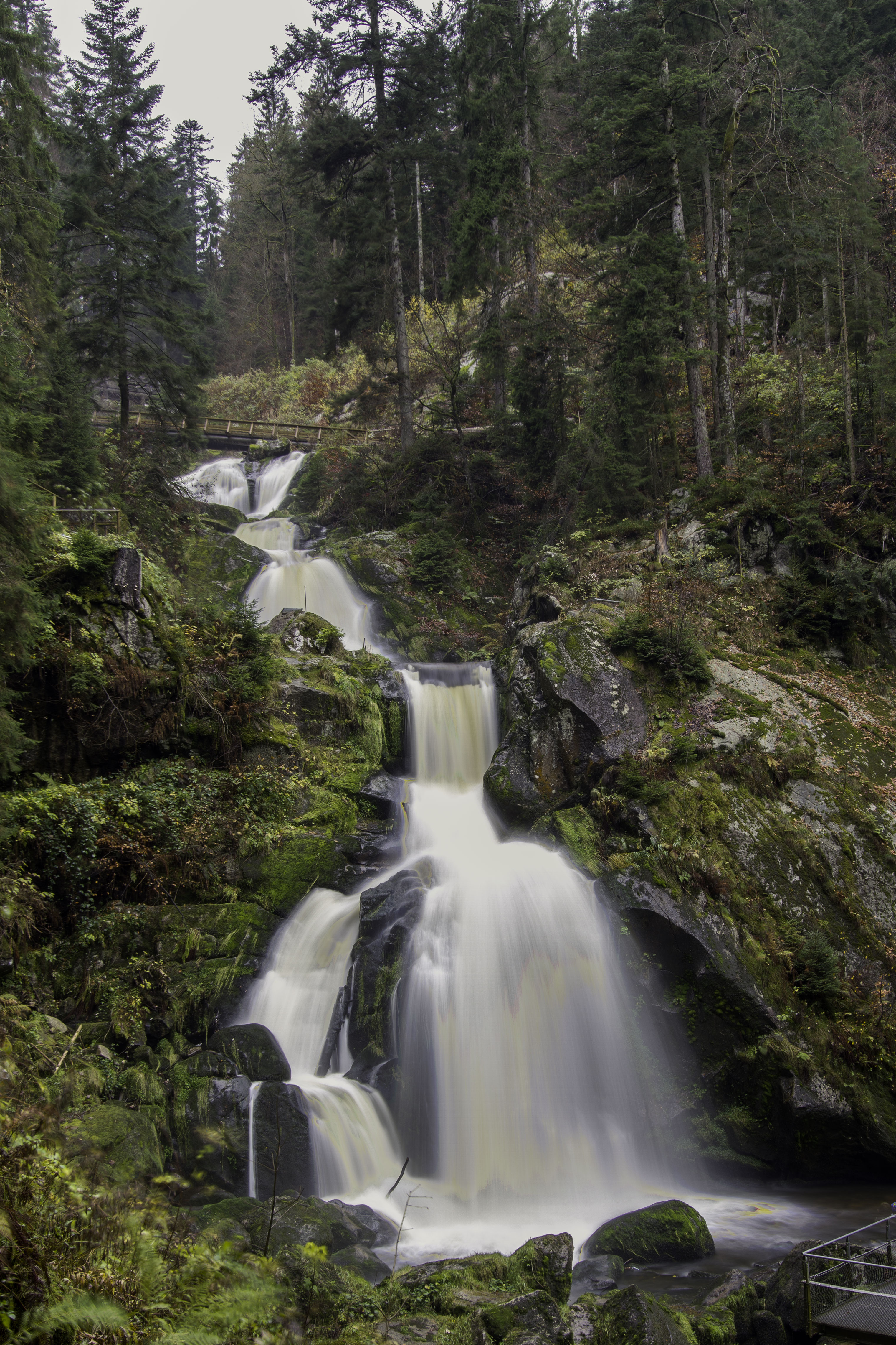 Cascade du Triberg en Forêt Noire